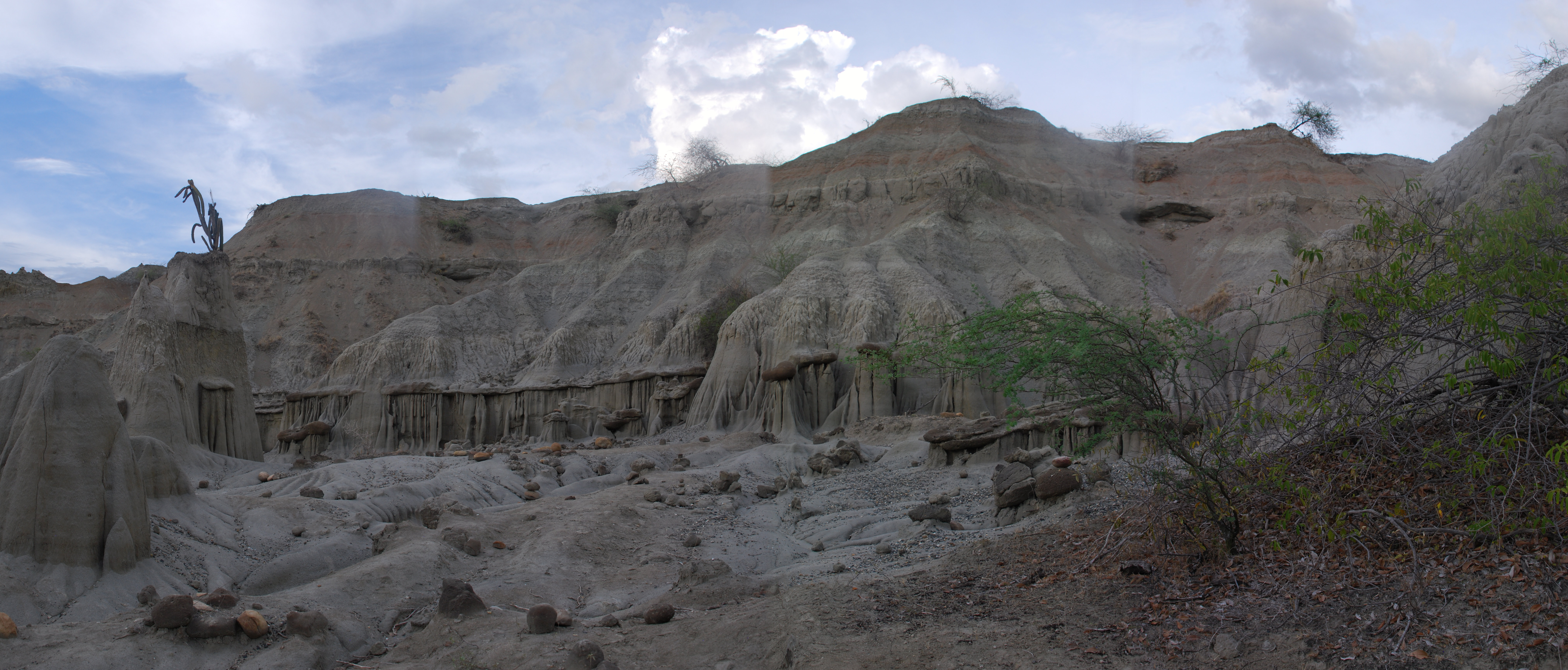 Het grijze gedeelte van de Tatcoa-woestijn